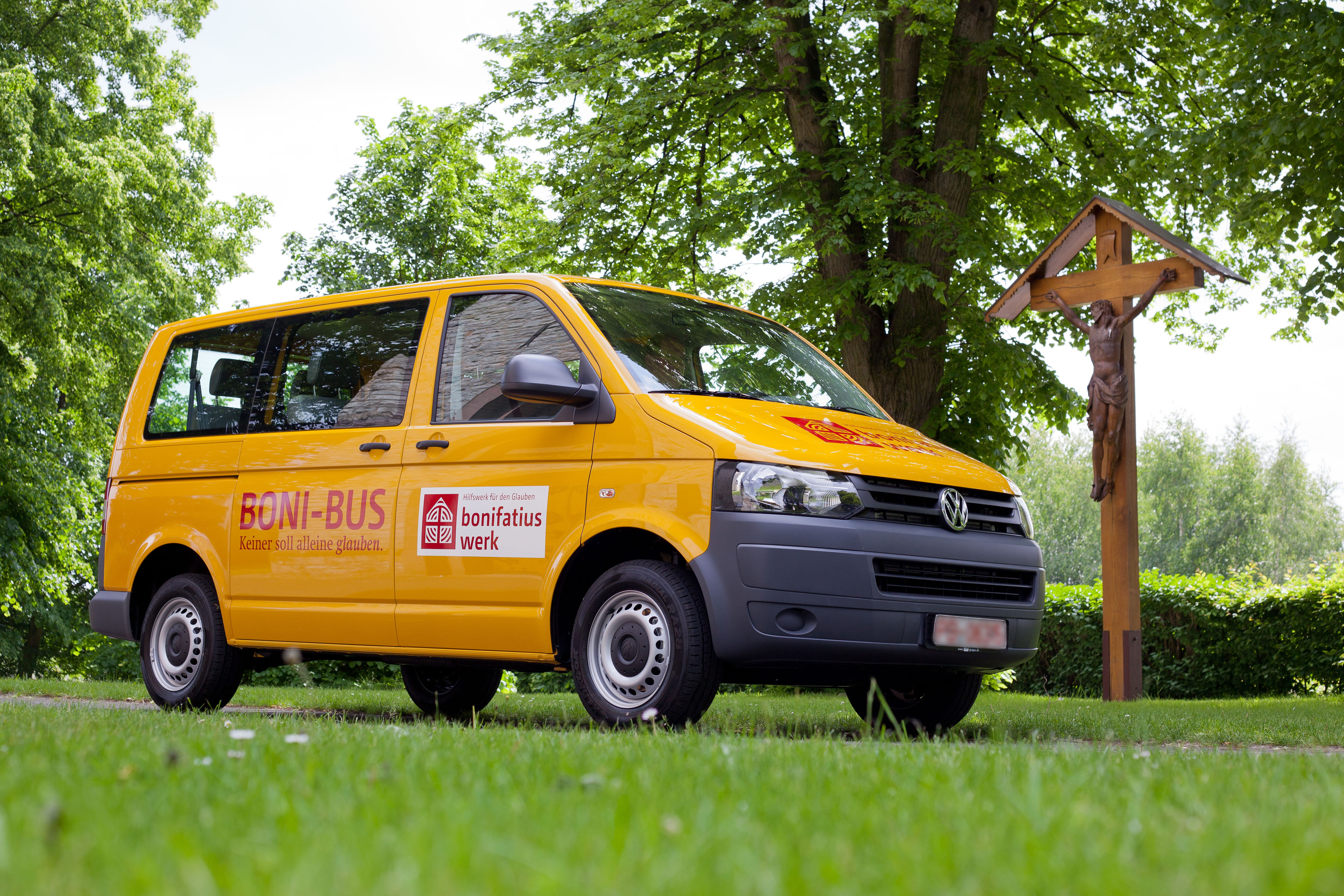 Ungefähr 600 BONI-Busse sind in Deutschland unterwegs.